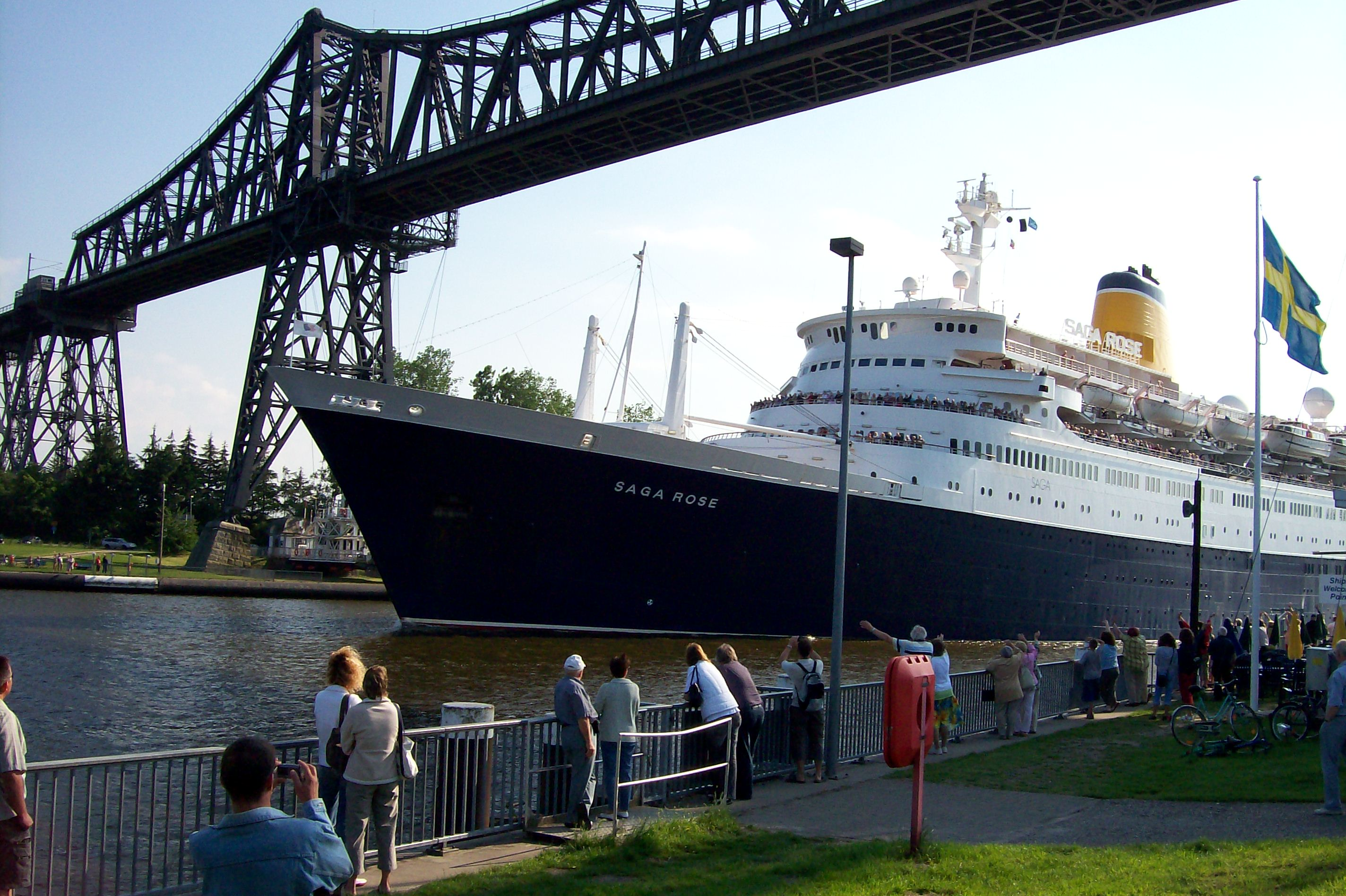 Bei der Rendsburger Eisenbahnhochbrücke befindet sich eine Schiffsbegrüßungsanlage, bei der alle passierenden Schiffe mit einem Flaggendip und der jeweiligen Nationalhymne begrüßt werden.